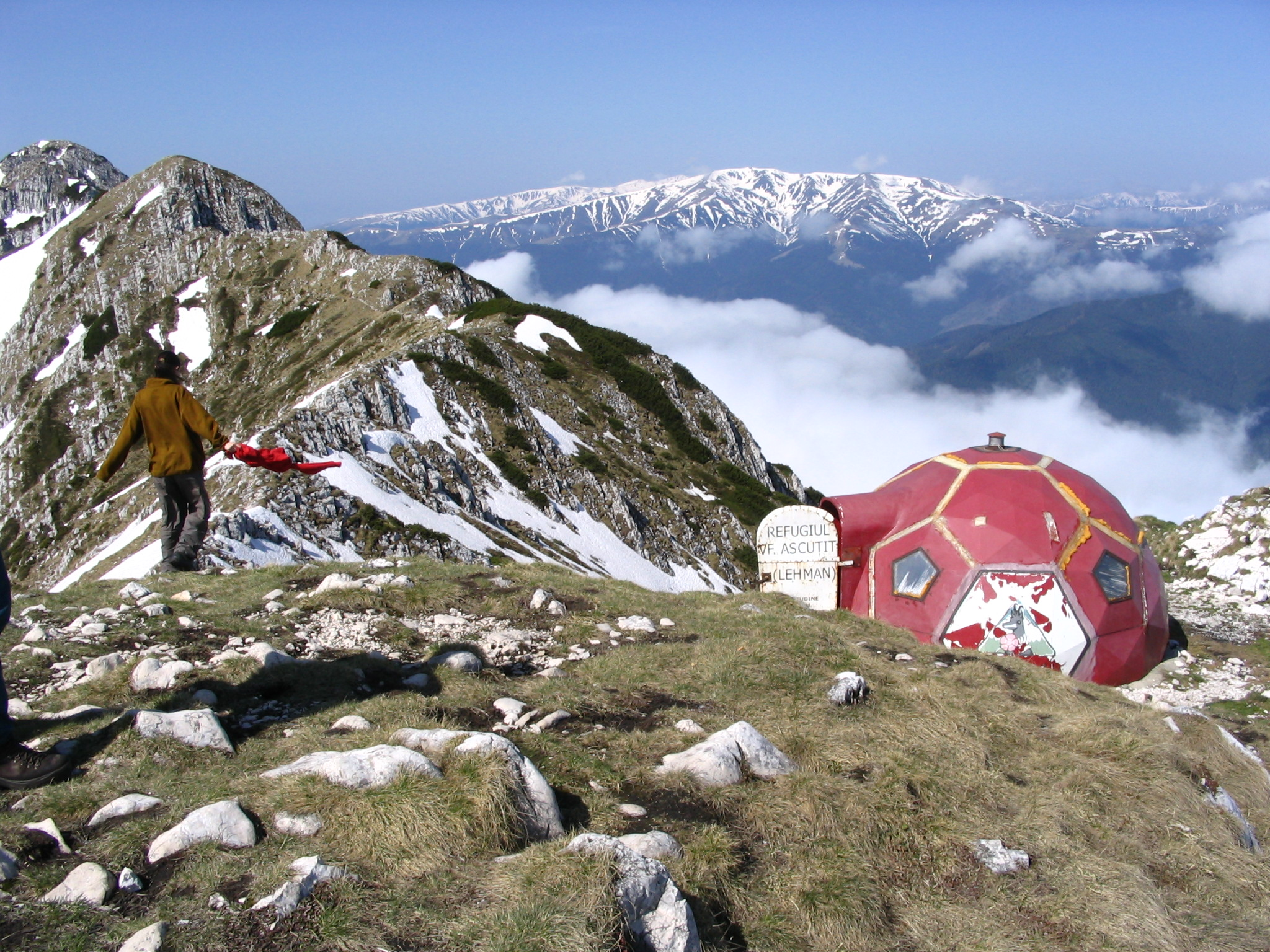 Refugiul Ascutit Carol Lehman, Piatra Craiului